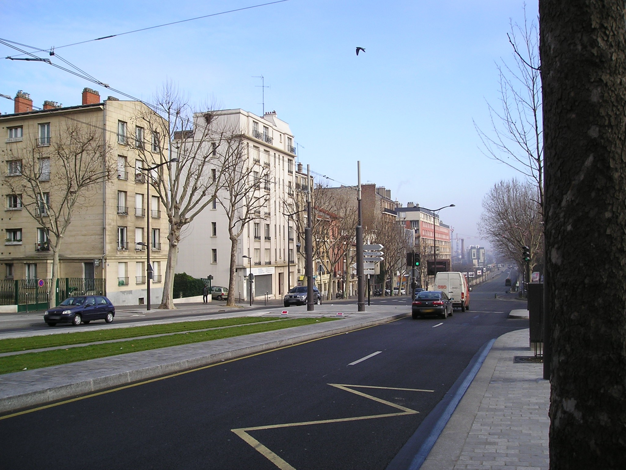 La fin des rails de la ligne 3 du tramway à l'est, boulevard Masséna. A l'arrière-plan, le boulevard se dirige vers les voies de la gare d'Austerlitz et la rive droite de la Seine.